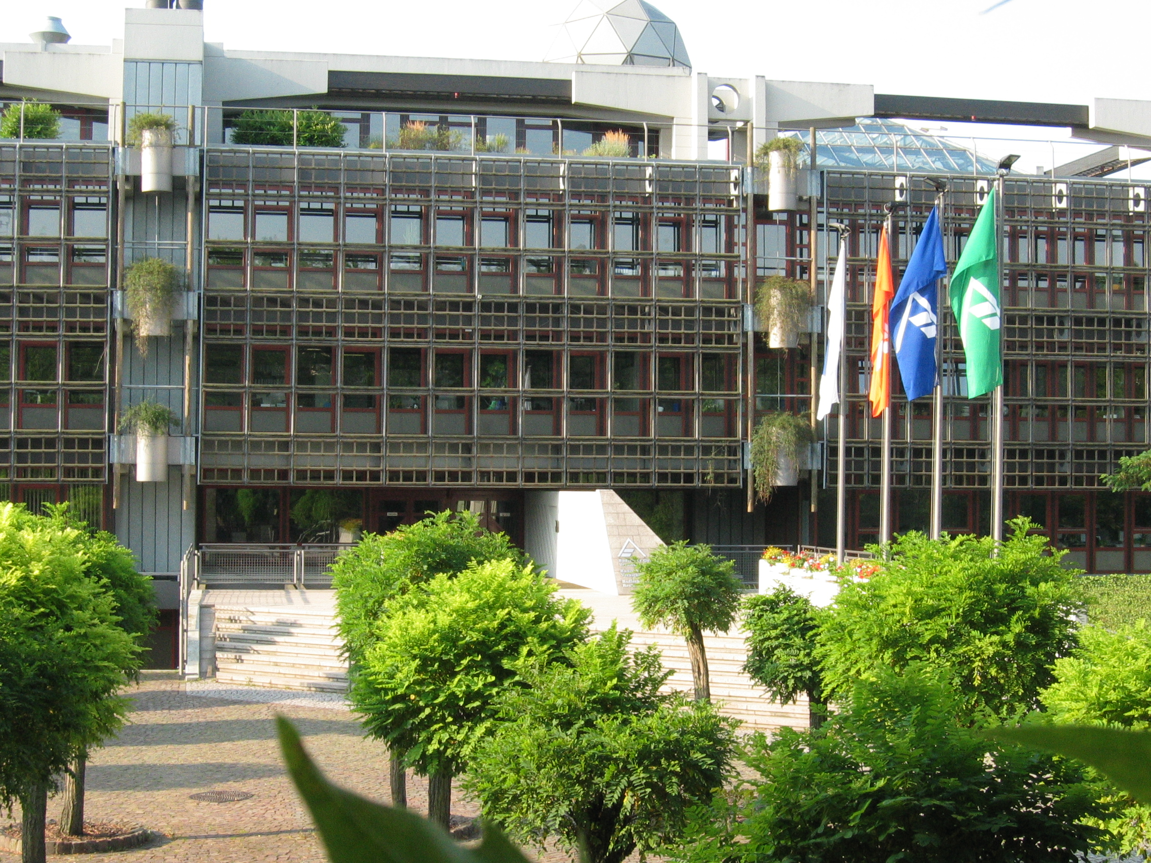 BGV-Direktion Karlsruhe, gemeinfrei